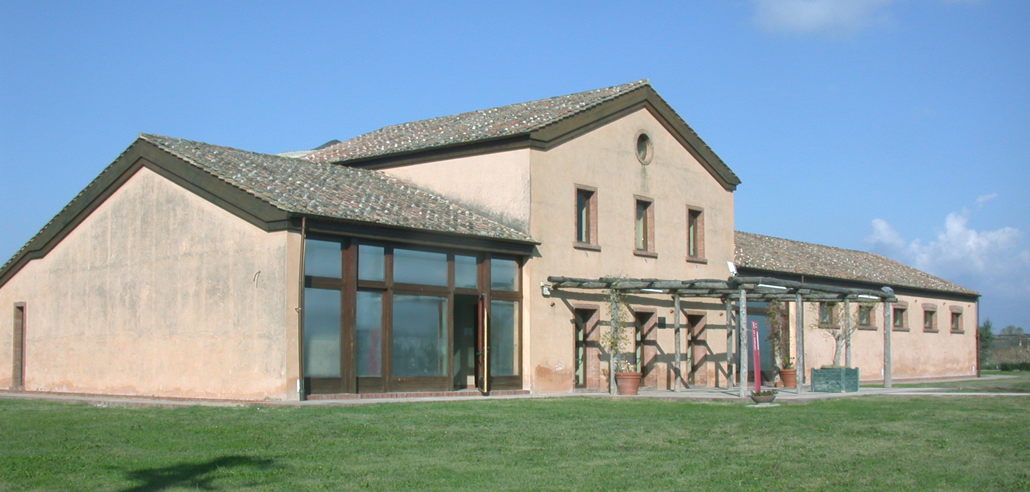 Italia, comune di Capaccio-Paestum in provincia di Salerno, la Masseria Procuriali, sede del "Museo narrante del santuario di Hera Argiva alla foce del Sele